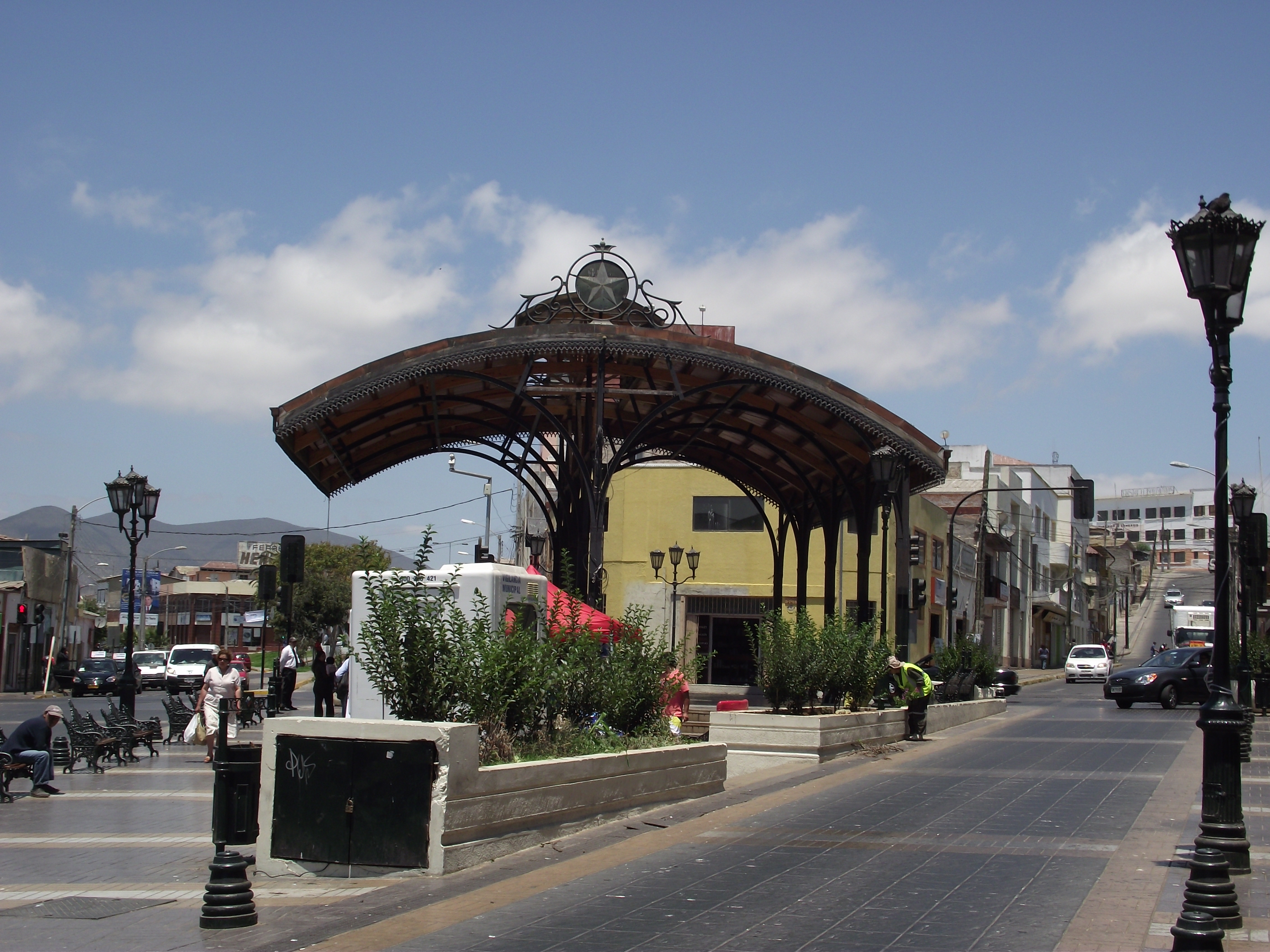 Empalme de Coquimbo